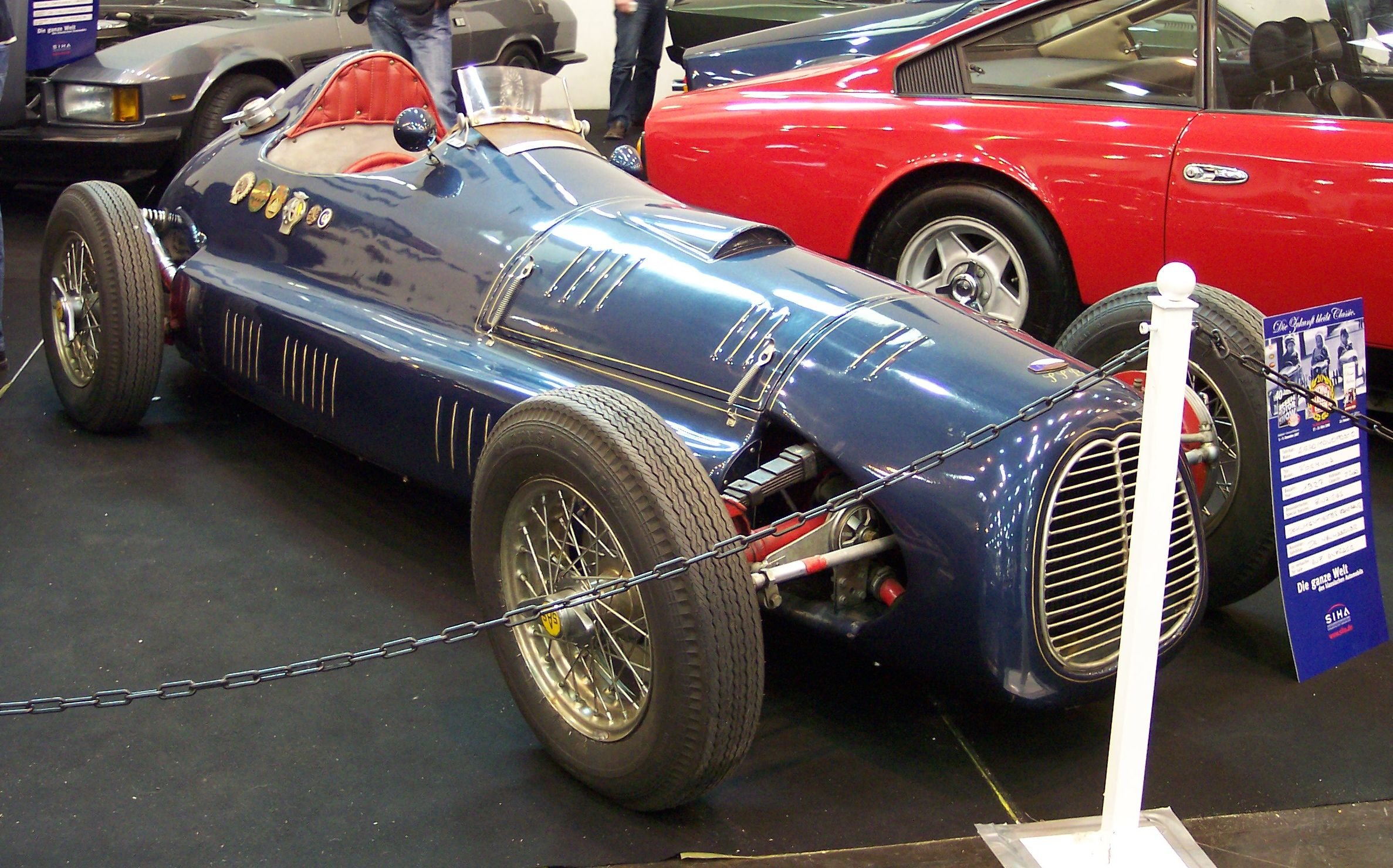 Aero Monoposto 1927